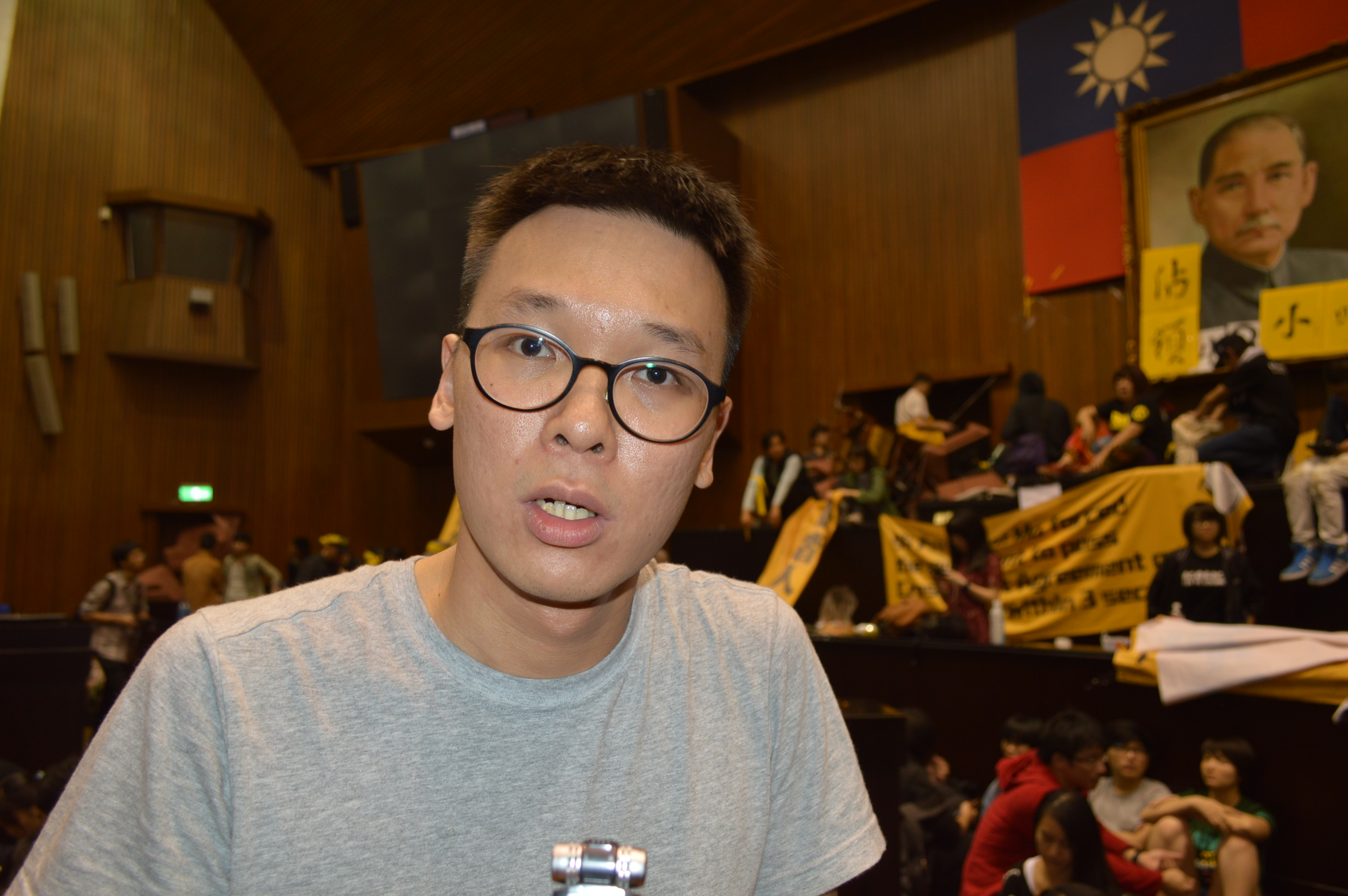 抗議學生組織者臺大的林飛帆。！！